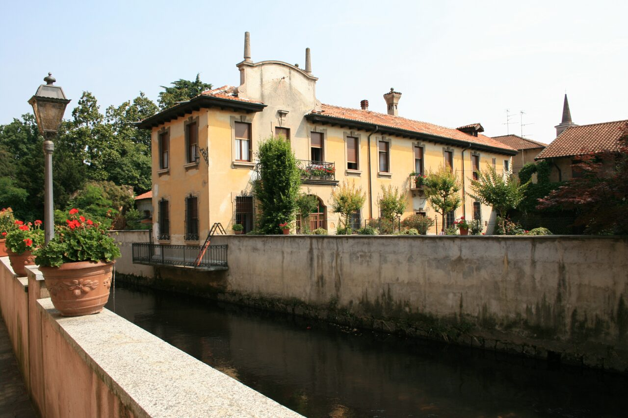 Nerviano. Il fiume Olona presso il Monastero degli Olivetani (oggi sede del municipio)